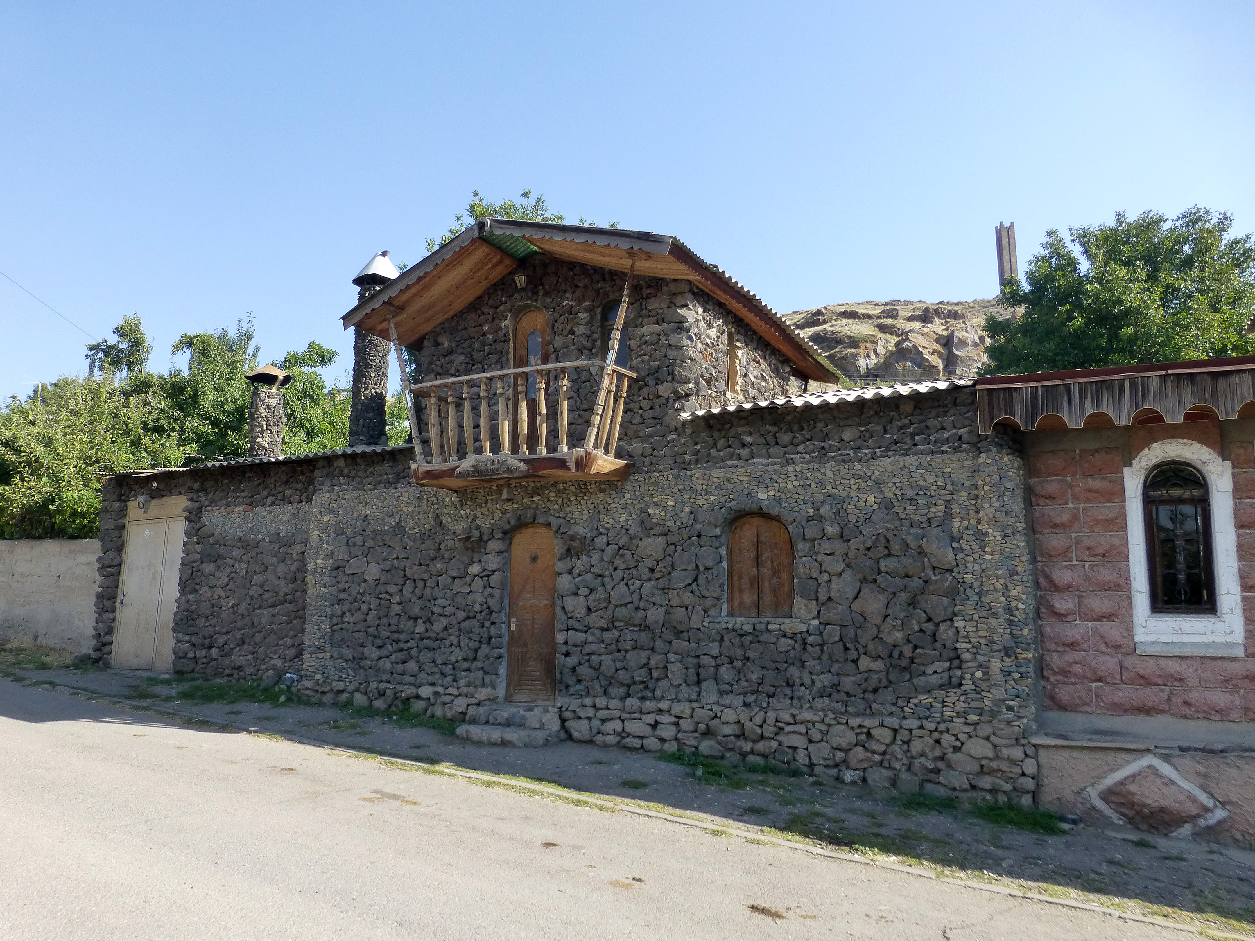 Maison en pierre à Sissian (Arménie).